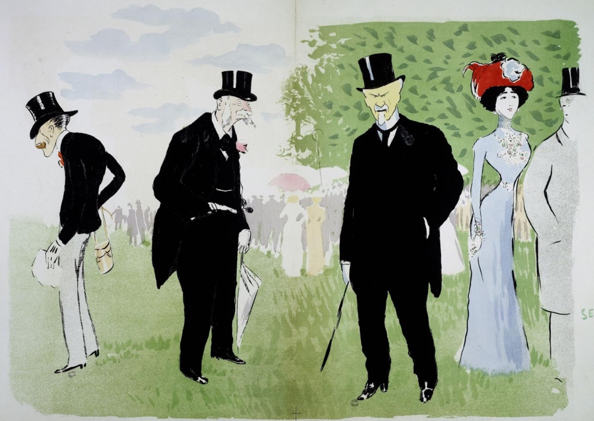 Mr Bamberger (père), Baron Alphonse de Rothschild, Mr Henri Rochefort, Lina Cavalieri (cantatrice)